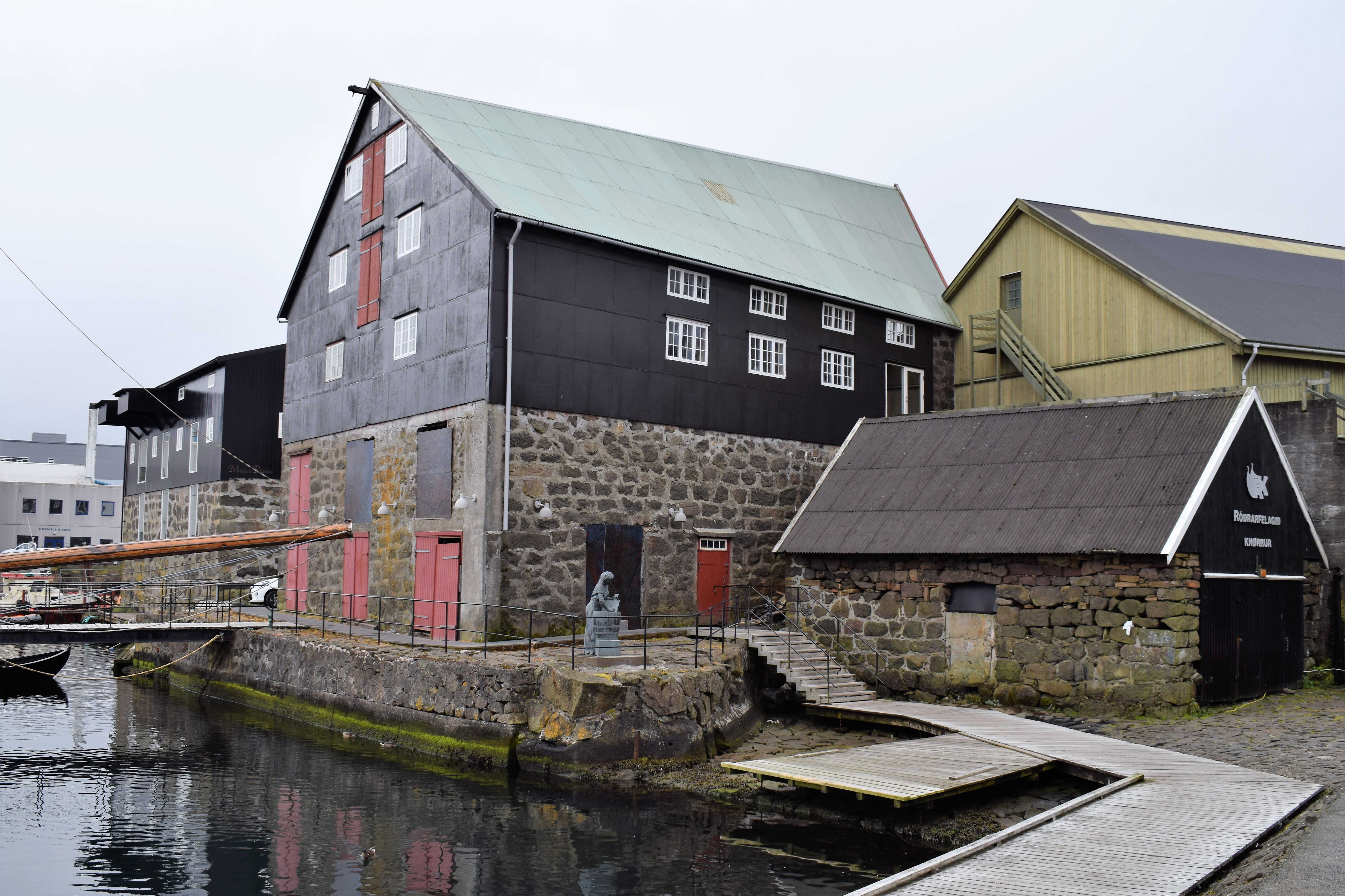 Føroyskt: Müllers pakkhús og Skeiva pakkhús við Vestaravág í Tórshavn.